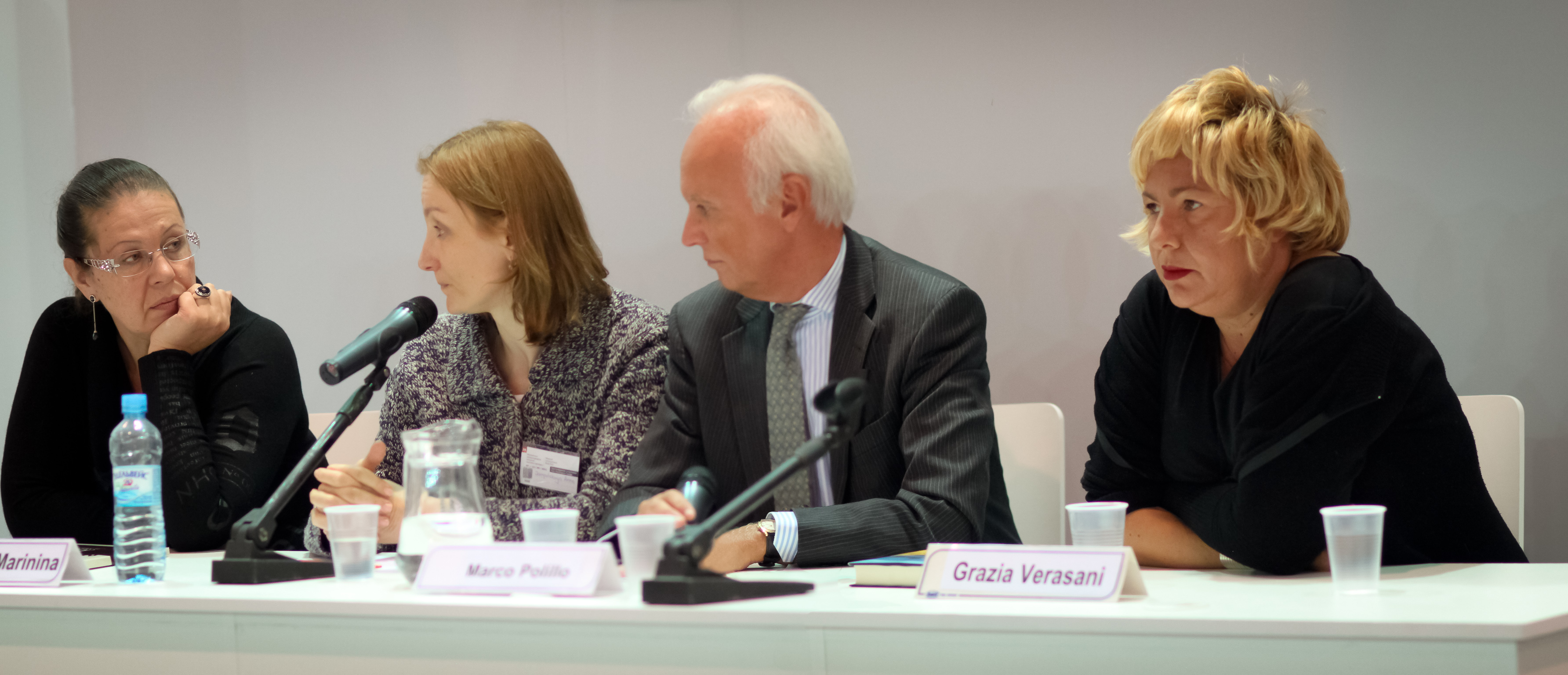 Александра Маринина и итальянские писатели: Марко Полилло и Грация Верасани на ММКВЯ-2011